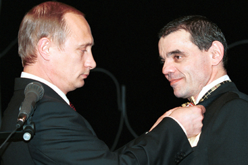 МОСКВА, театр «Сатирикон». Награждение Константина Райкина орденом «За заслуги перед Отечеством» IV степени.